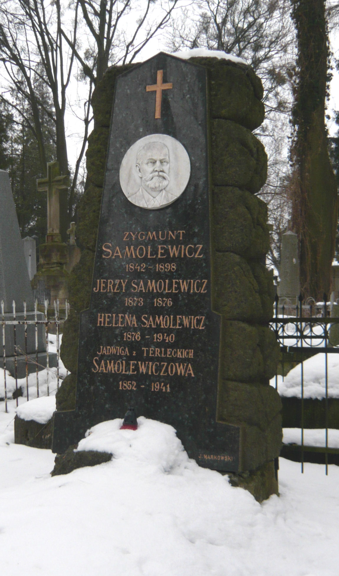 Nagrobek Zygmunta Samolewicza na Cmentarzu Łyczakowskim we Lwowie.